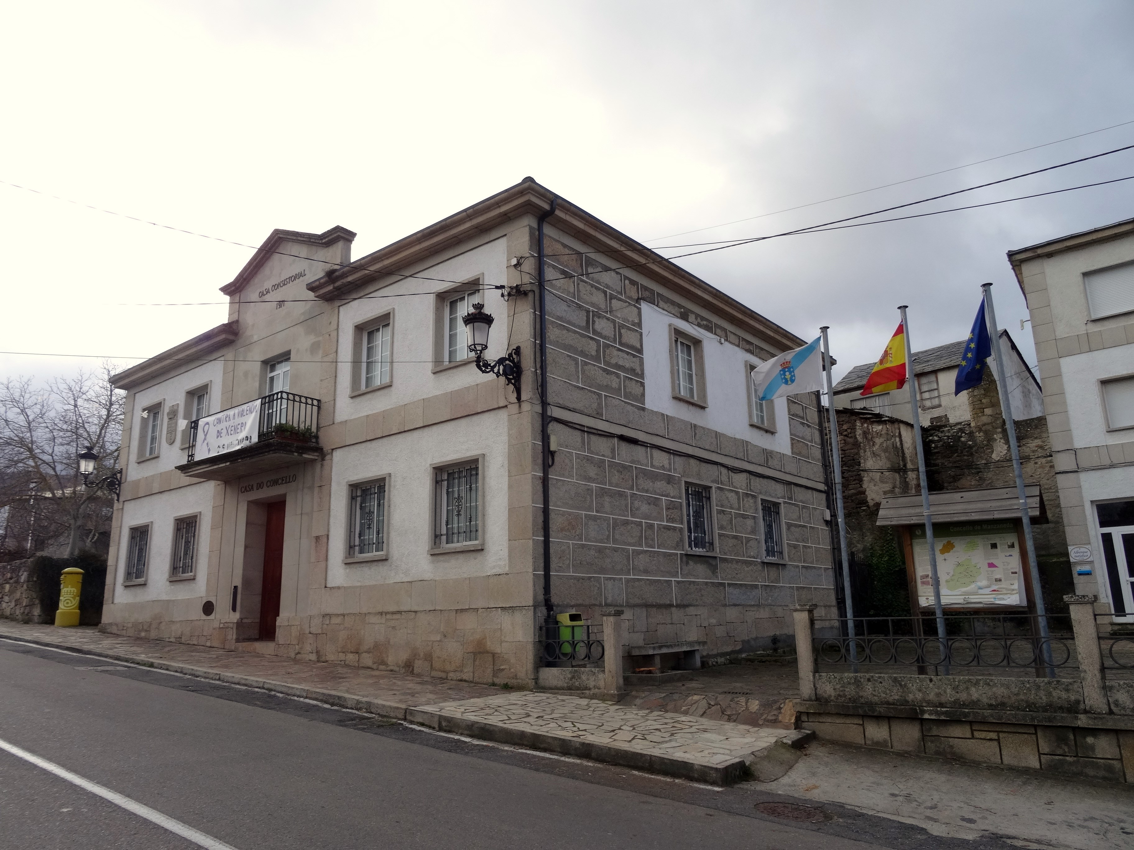 Casa do concello de Manzaneda.